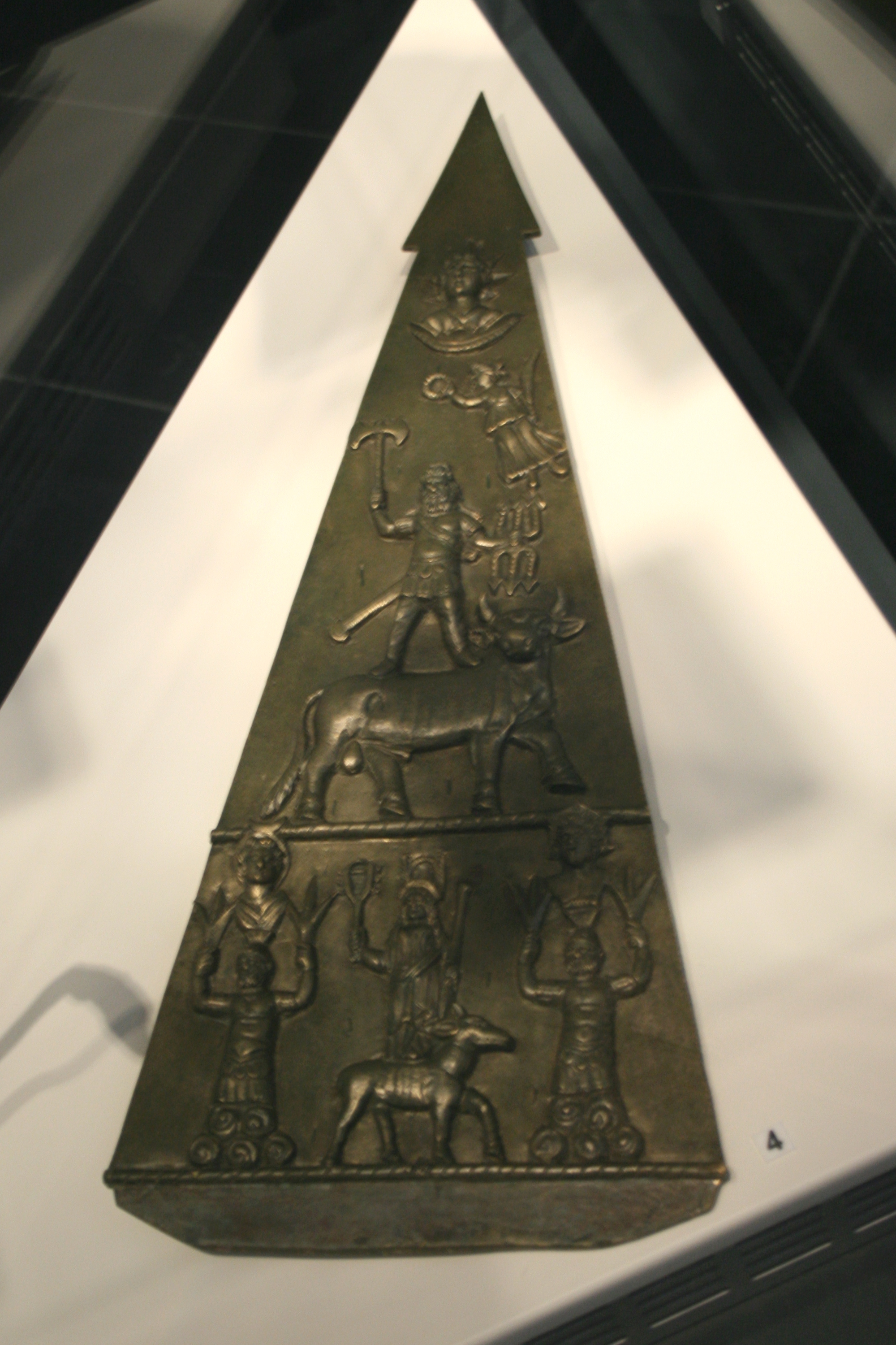 Dreieckiges Bronzeblech mit Jupiter-Dolichenus-Darstellung aus Nida-Heddernheim, heute im Bestand des Museums Wiesbaden. Aufgenommen in der Avitus-Ausstellung des Römermuseums Osterburken.